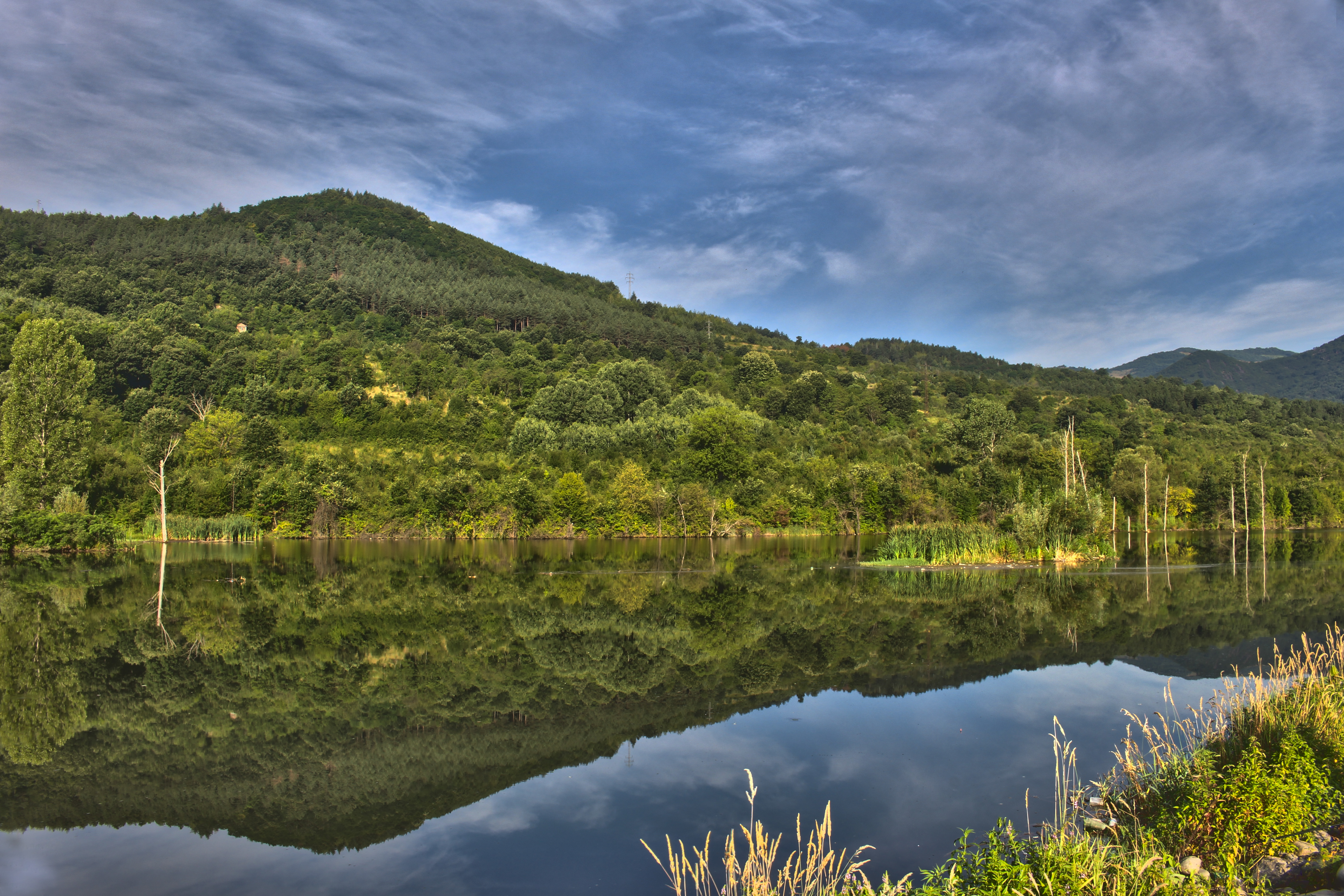 Врачански Балкан